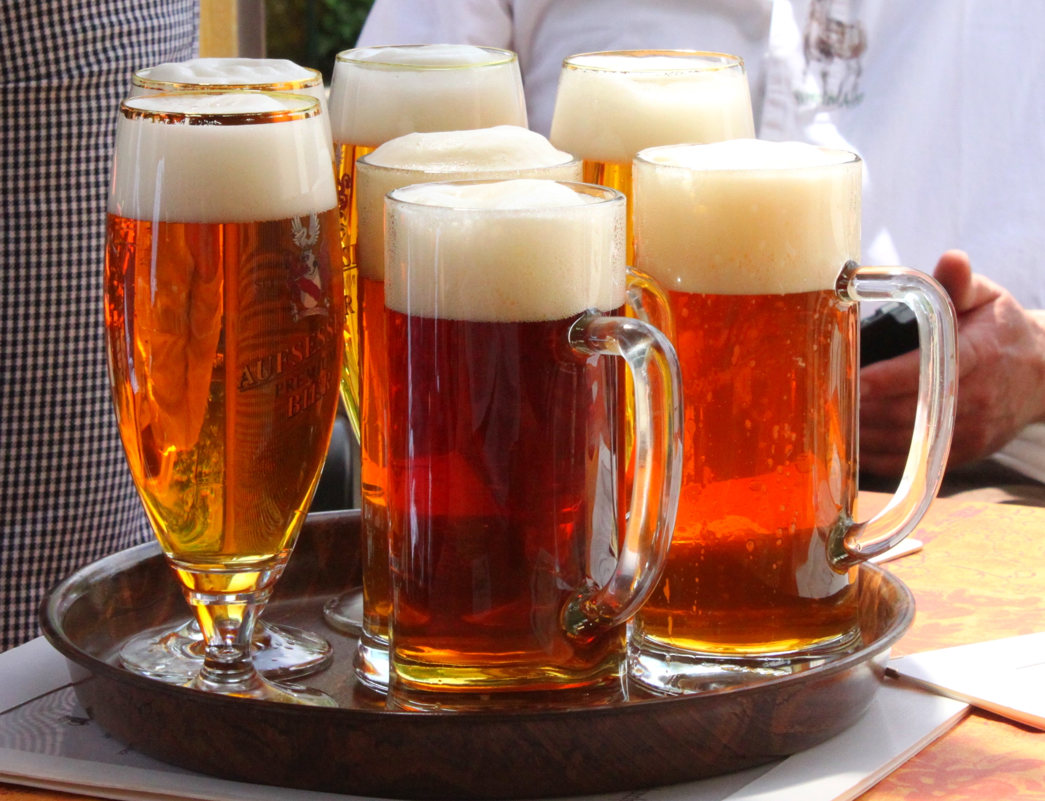 Tablett mit Bier im Brauereigasthof Rothenbach in Aufseß